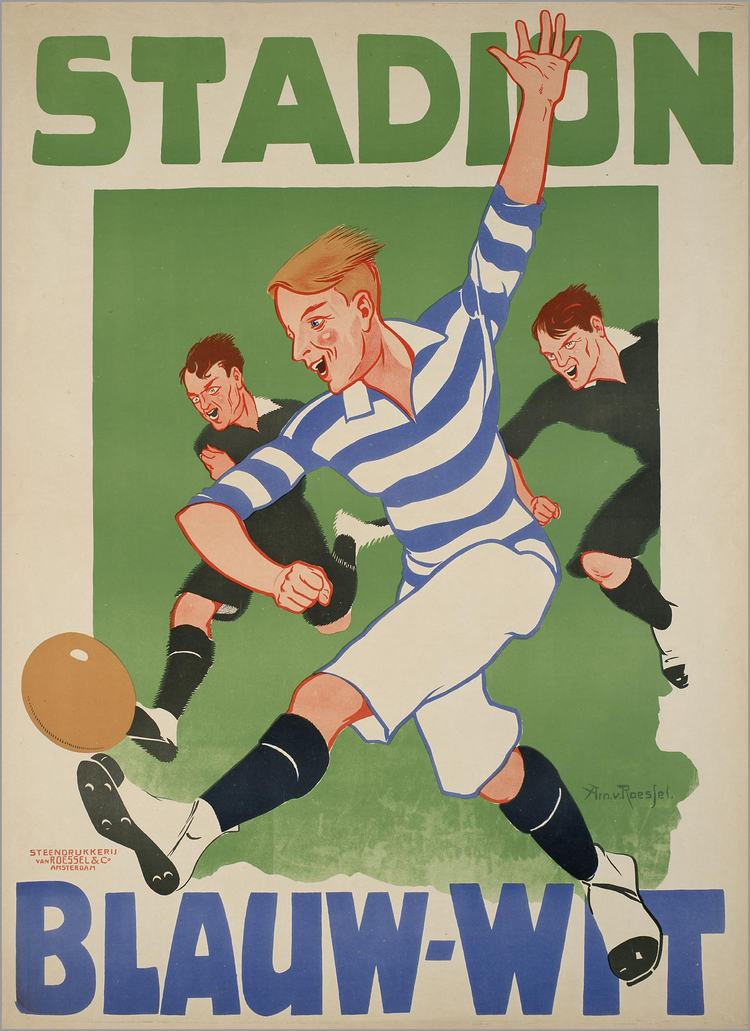 Stadion Blauw-Wit Maker ontwerper/artdirector: Roessel, Arnold van drukker: Steendrukkerij van Roessel & Co